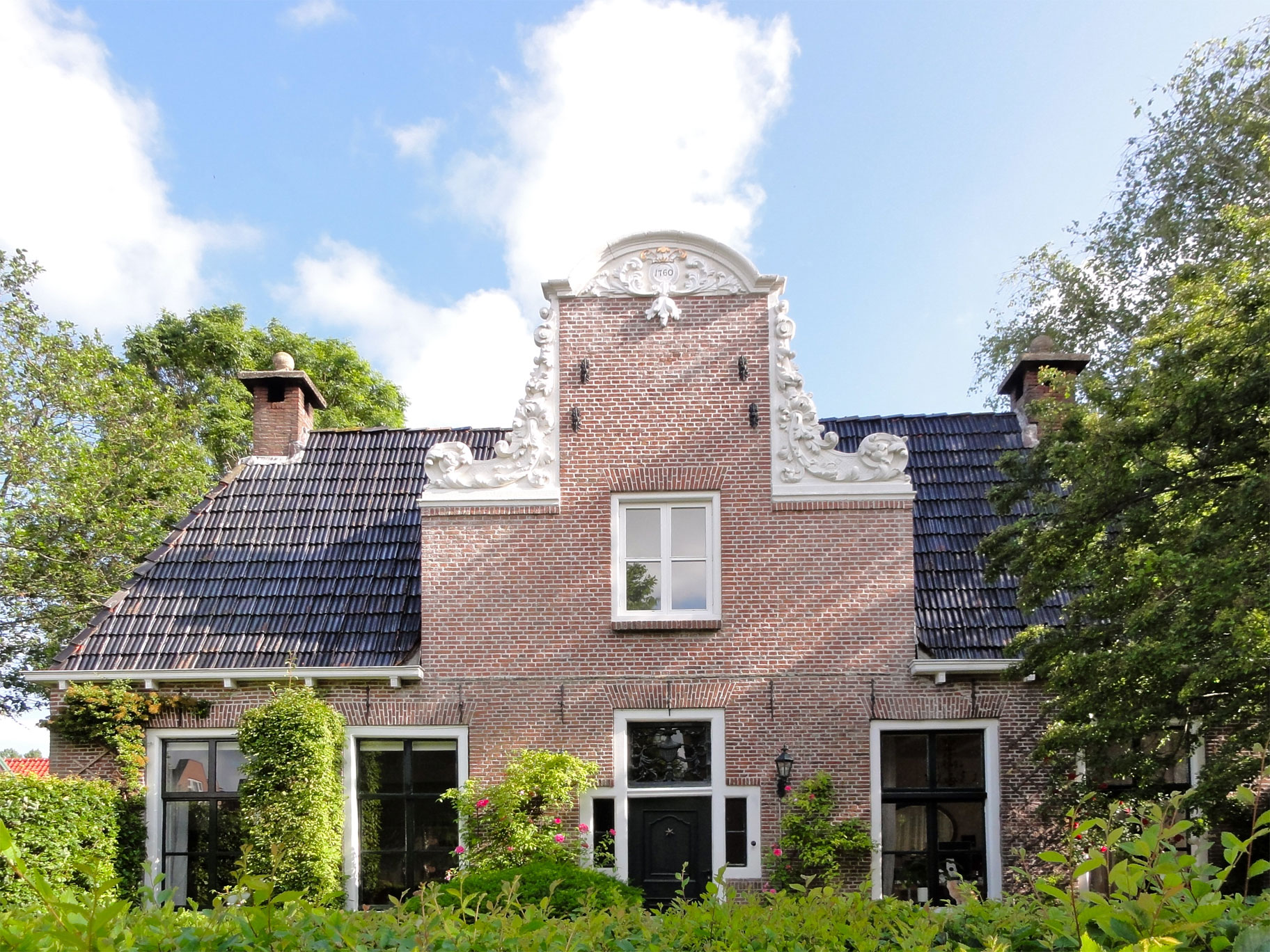 Hervormde pastorie Georg van Saksenstraat 3 in Sint-Jacobiparochie